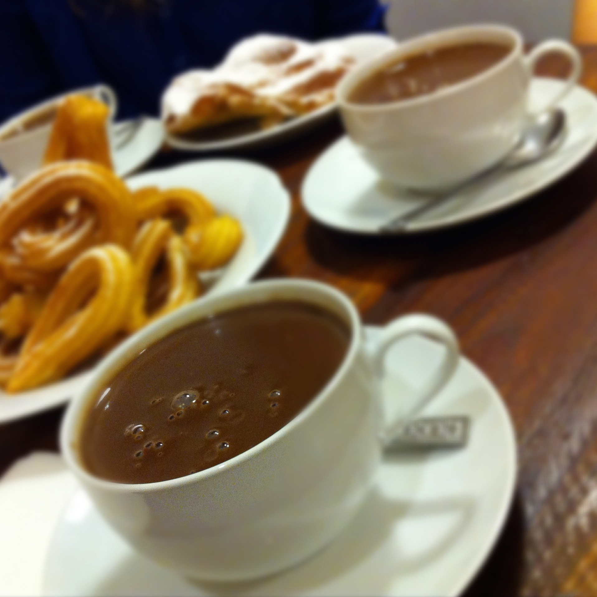 Chocolate a la taza, acompañado de churros y ensaimada Foto tomada con iPhone4